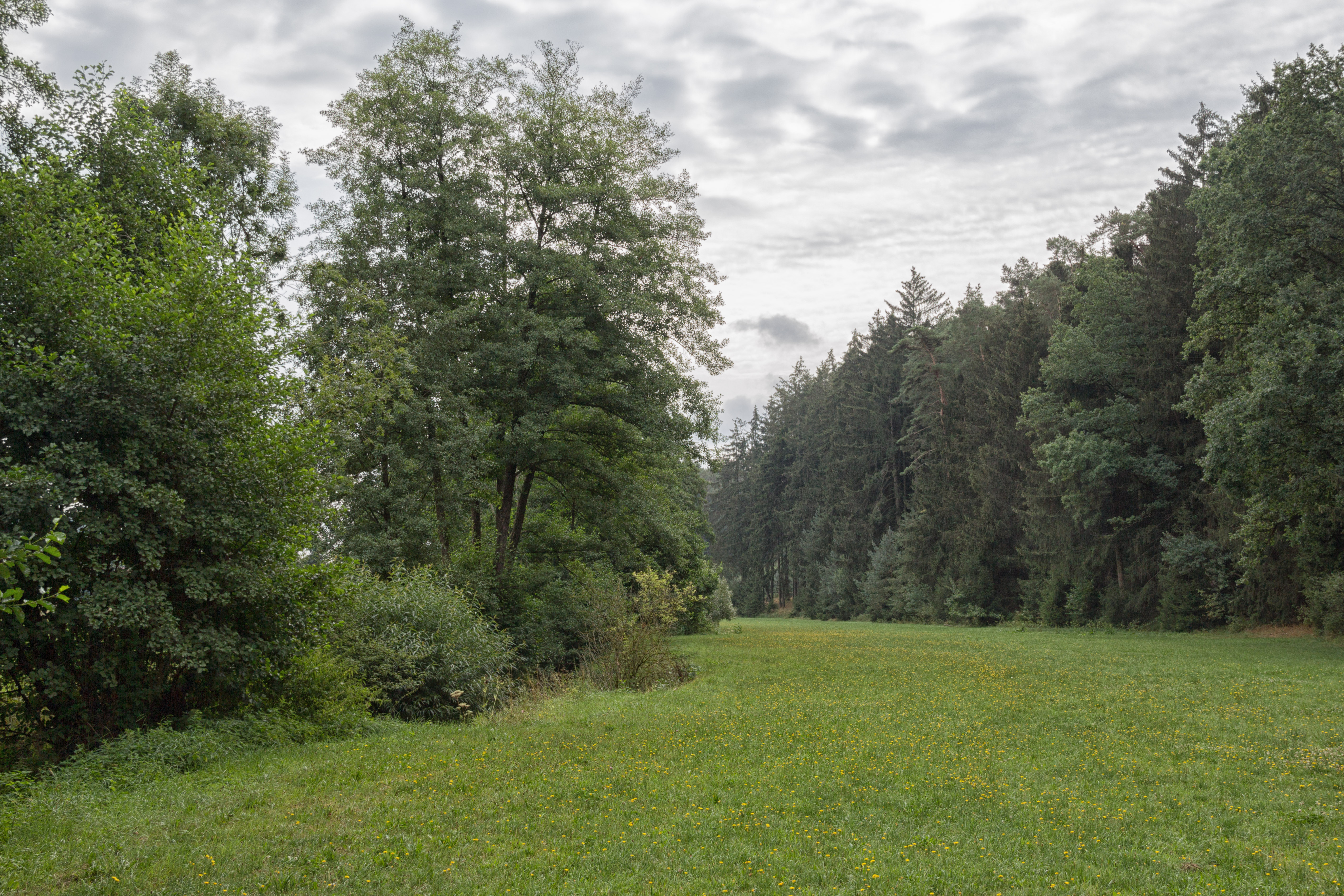 Bibert, Großhabersdorf, Naturpark und LSG Frankenhöhe